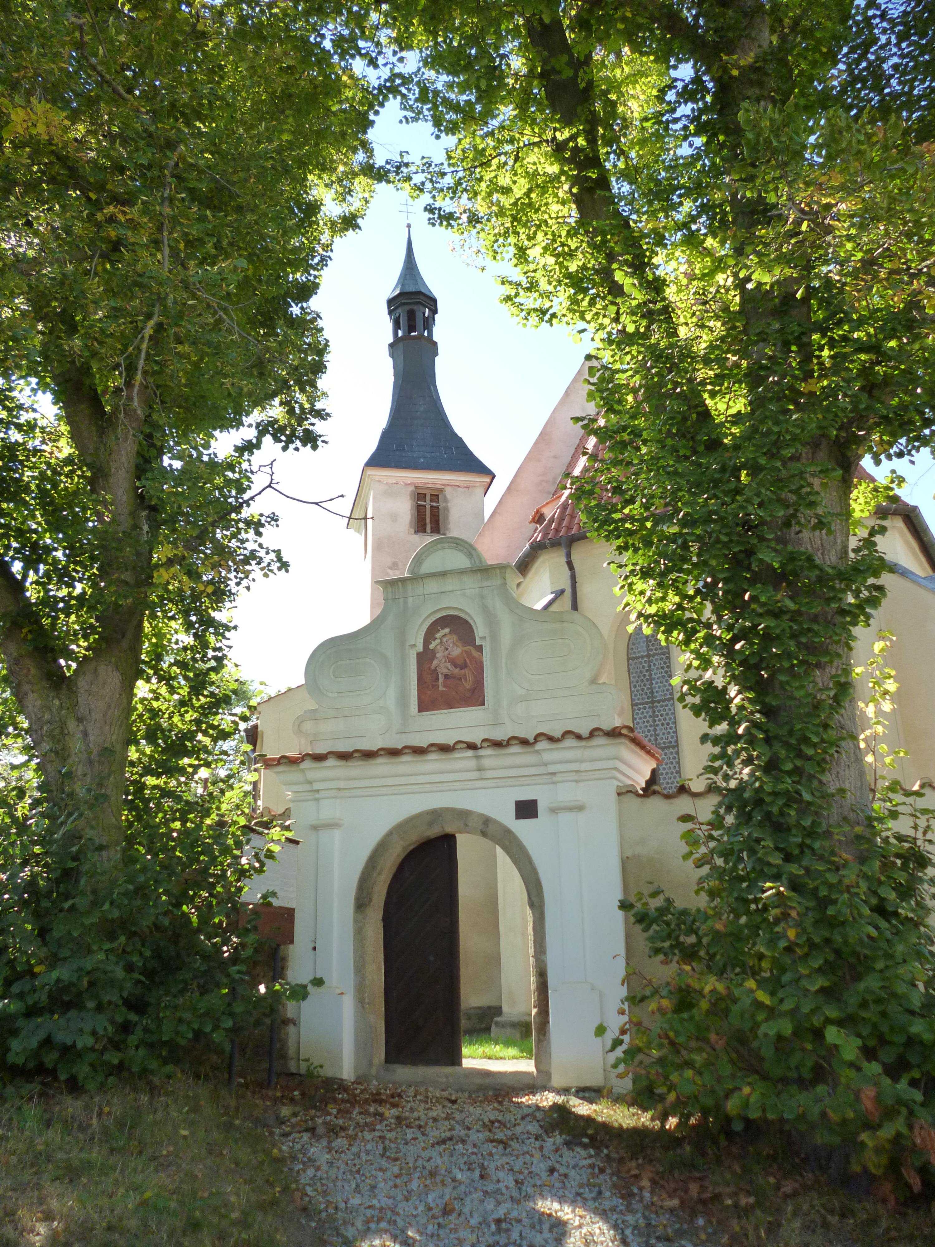 Kostel Všech svatých v Horšově